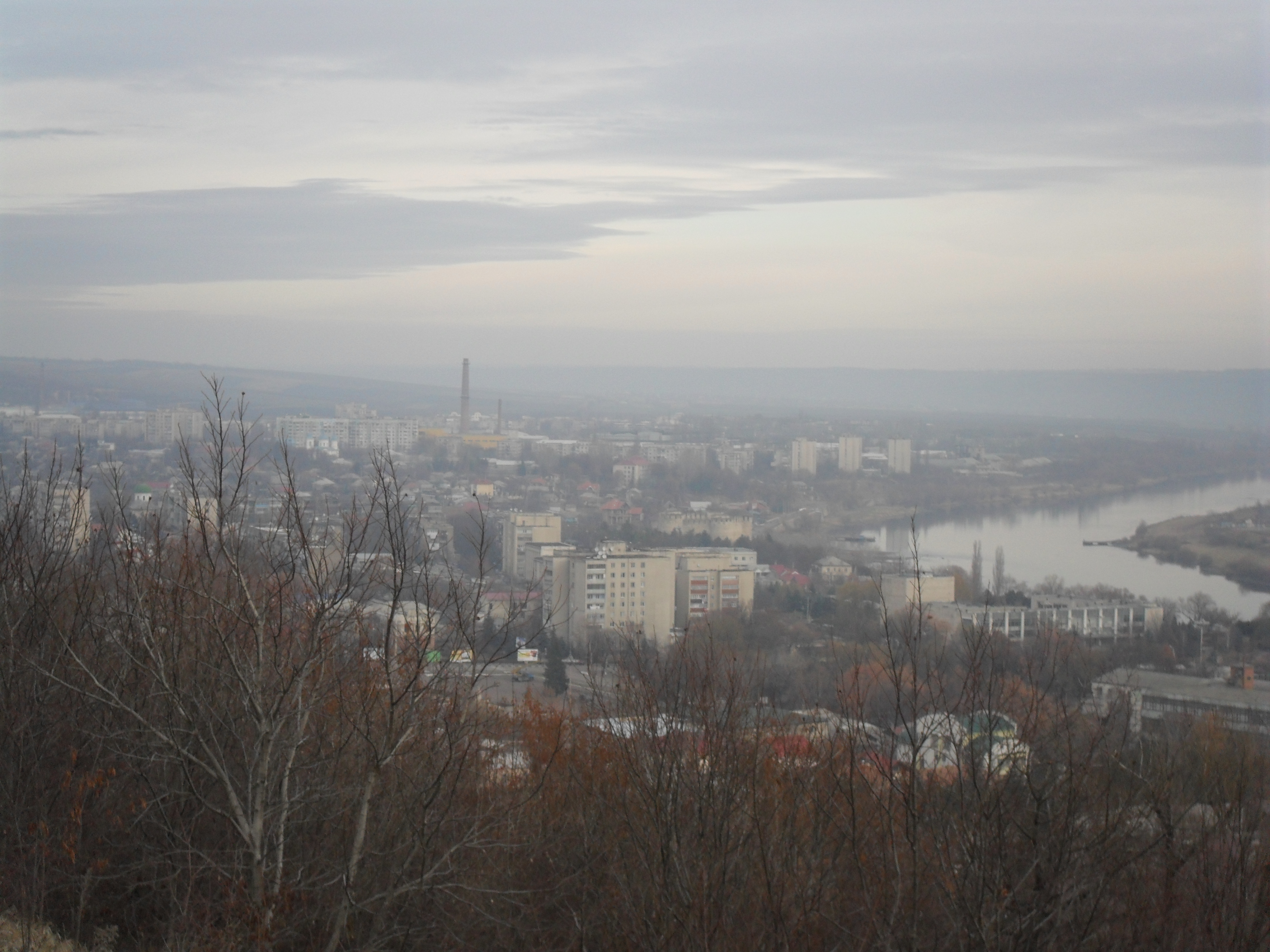 м. Сороки. Краєвид